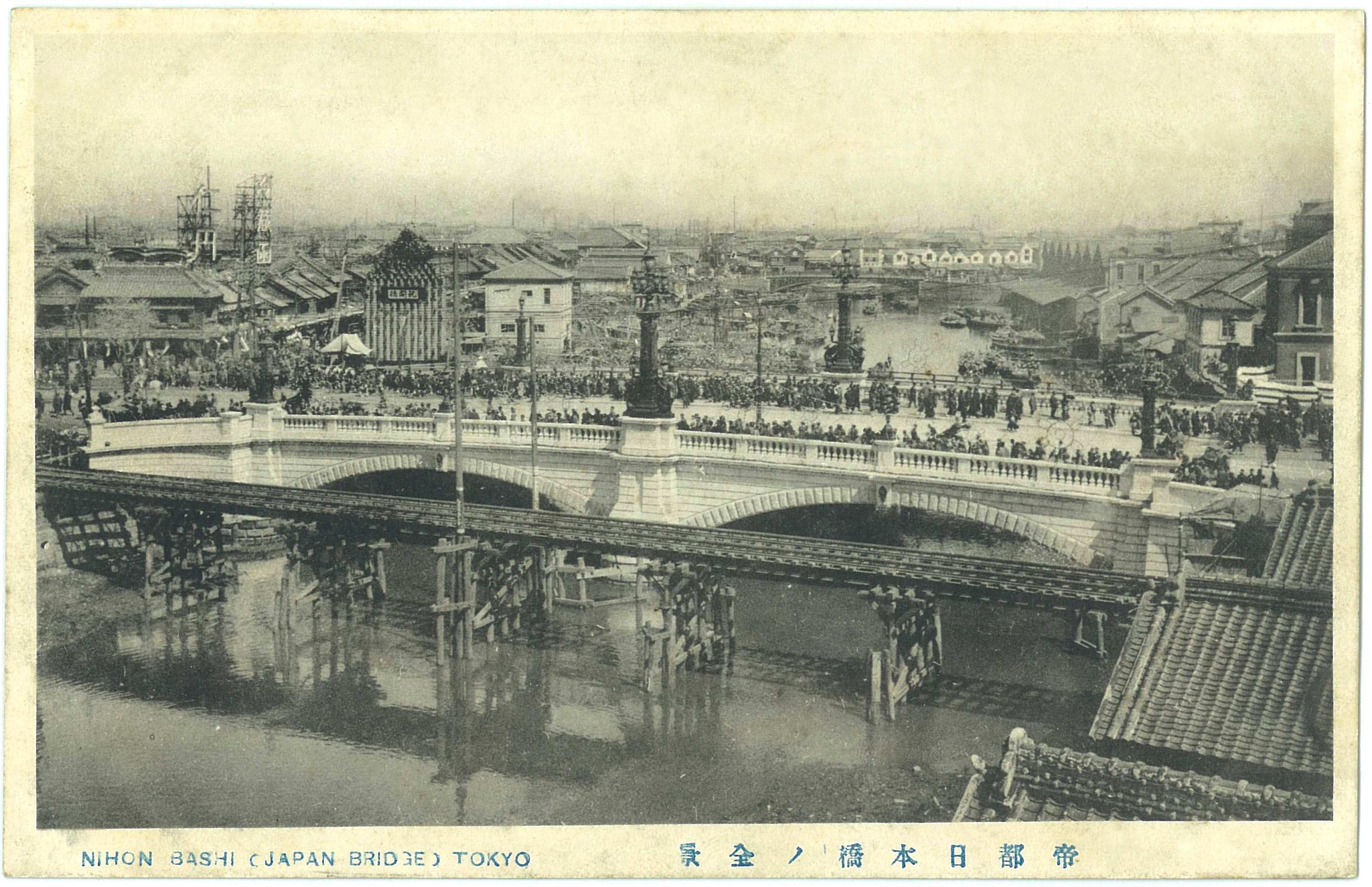 1911年（明治44年）4月、開通したばかりの新しい日本橋を見物する人々。開通式の4月3日は雨であったようで、画像は開通当日ではない（？）。手前の木造橋は本体工事期間に利用された仮設橋。左奥には当時のランドマークの仁丹塔があり、その手前にある多数の桶を重ねたものは、日本橋魚河岸の有志らが自主作成した伝統的な祝い飾りで「祝開橋」の文字が見える。